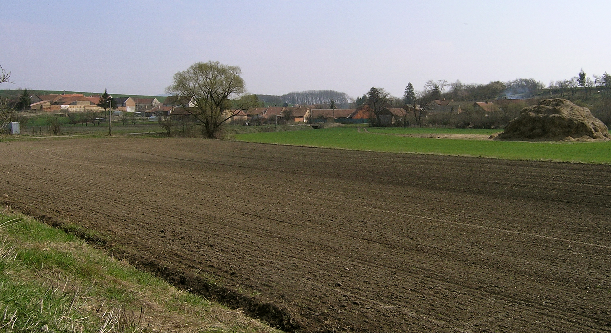 Kojátk - historická retenční nádrž; pohled od statku směrem na Šardičky.